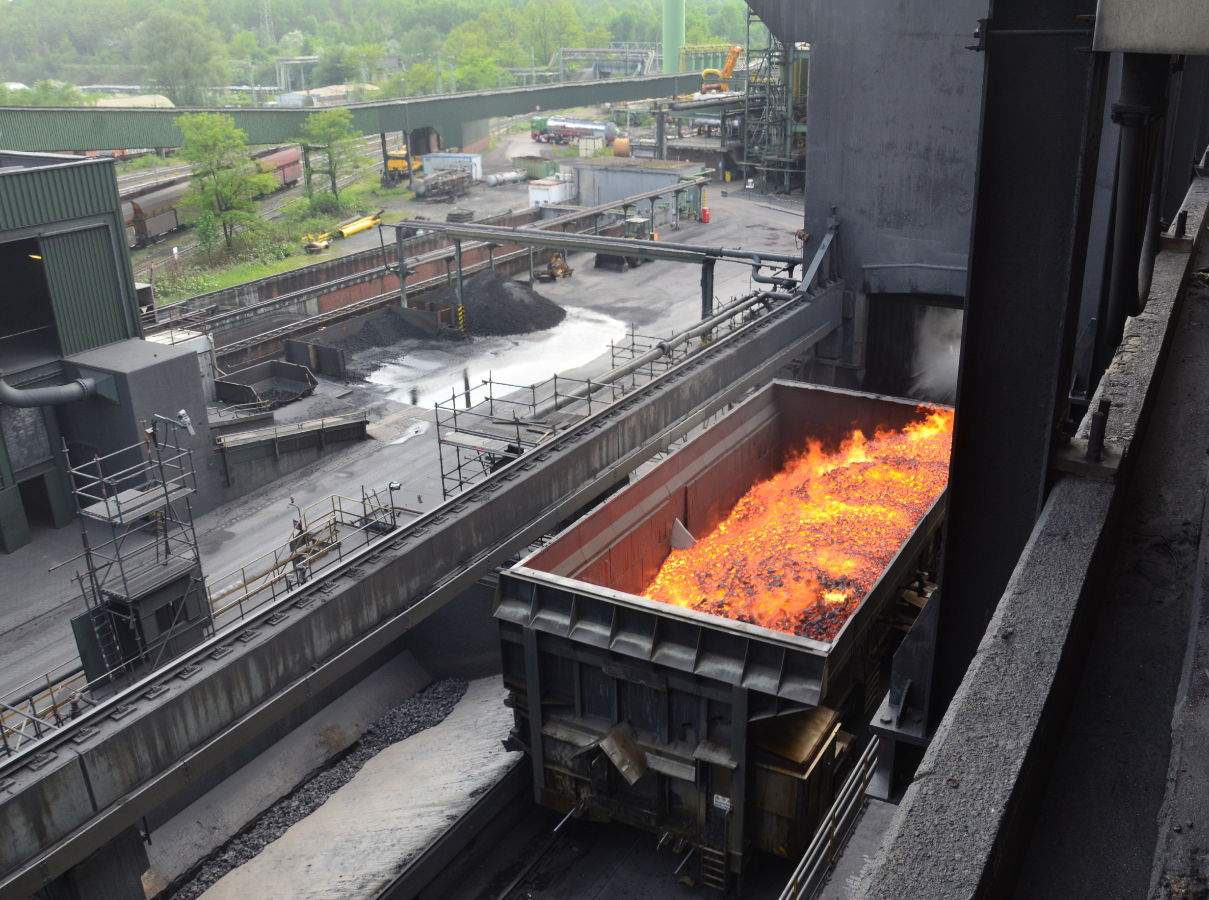 Kokerei Prosper, Bottrop Fahrt des glühenden Koks zum Löschturm